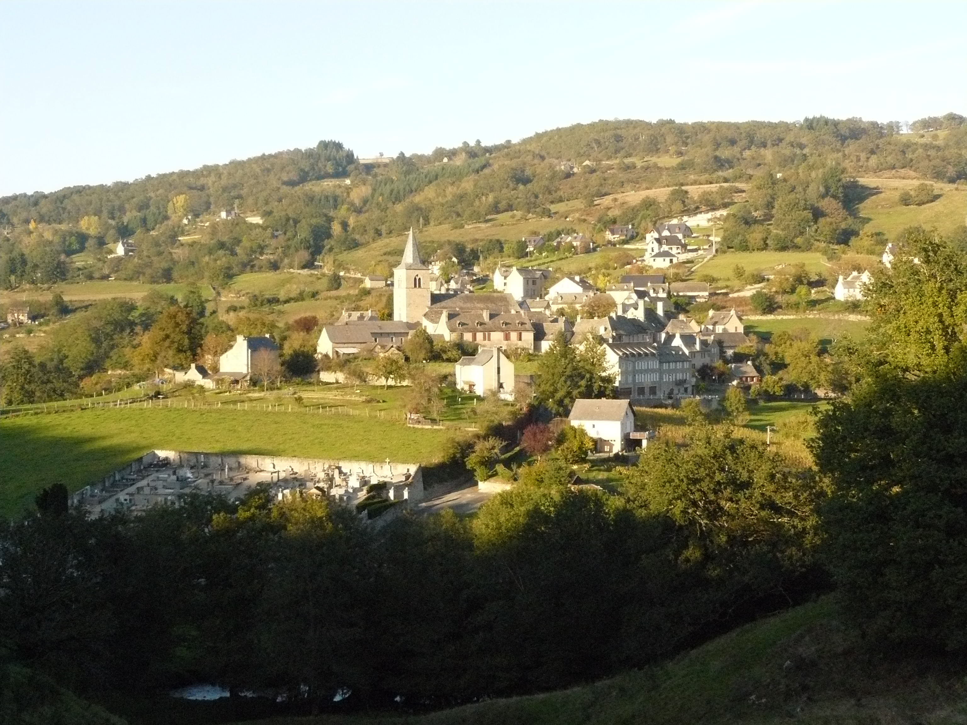 Espeyrac vue GR 65